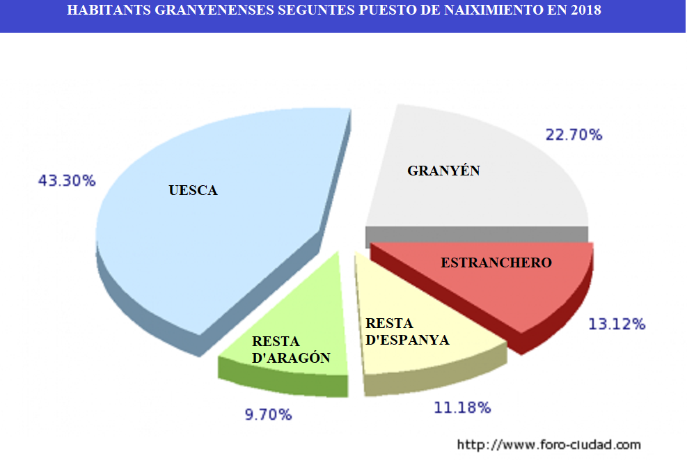 Aragonés: Habitants granyenenses seguntes puesto de naiximiento en 2018.